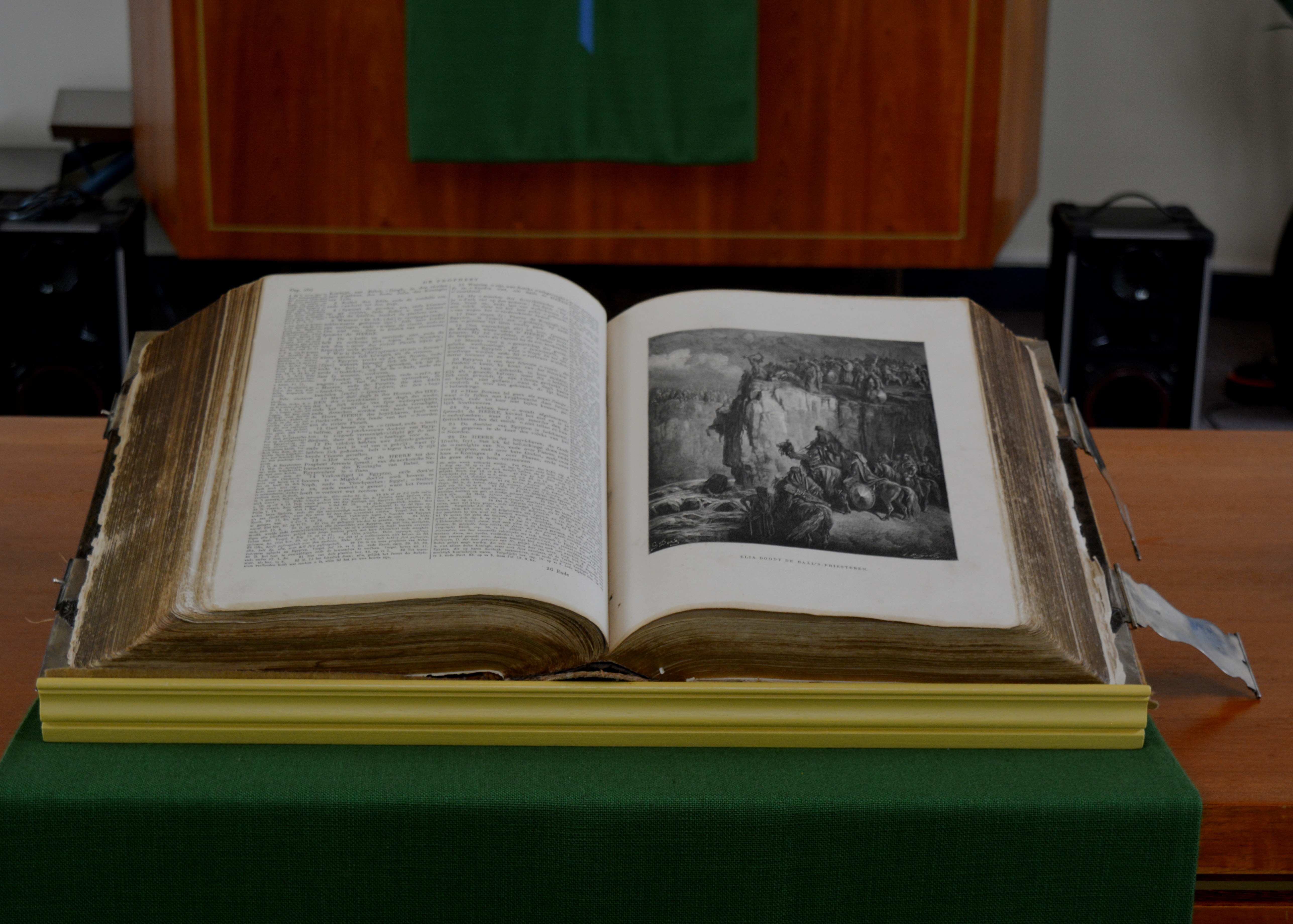 Wouterswoude, geref. kerk, bijbel